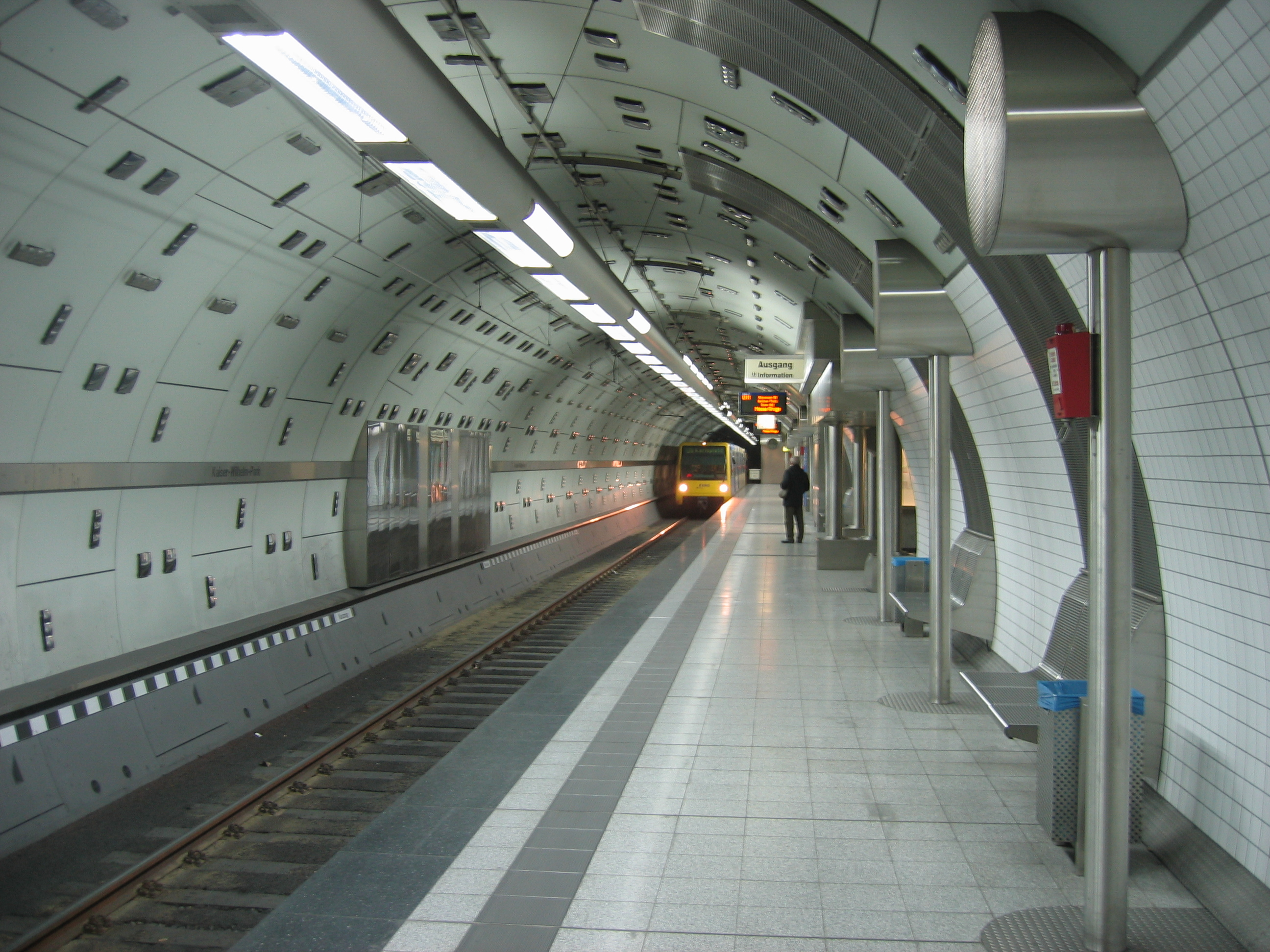 U-Bahnhof Kaiser-Wilhelm-Park der Stadtbahn Essen